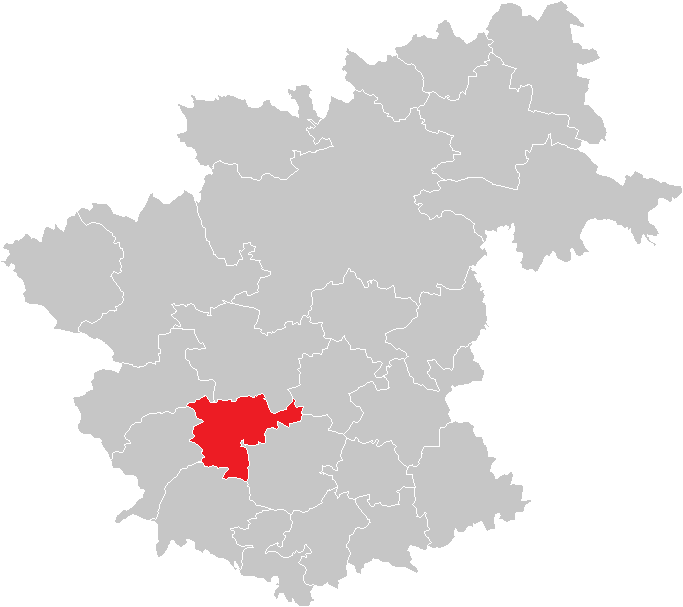 Bezirk Zwettl